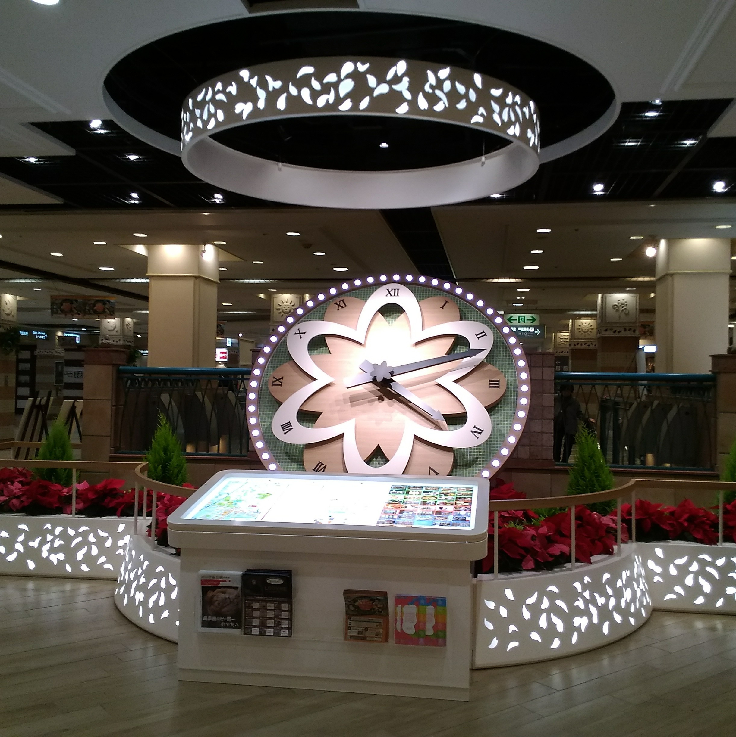 大阪府大阪市天王寺区堀越町の写真